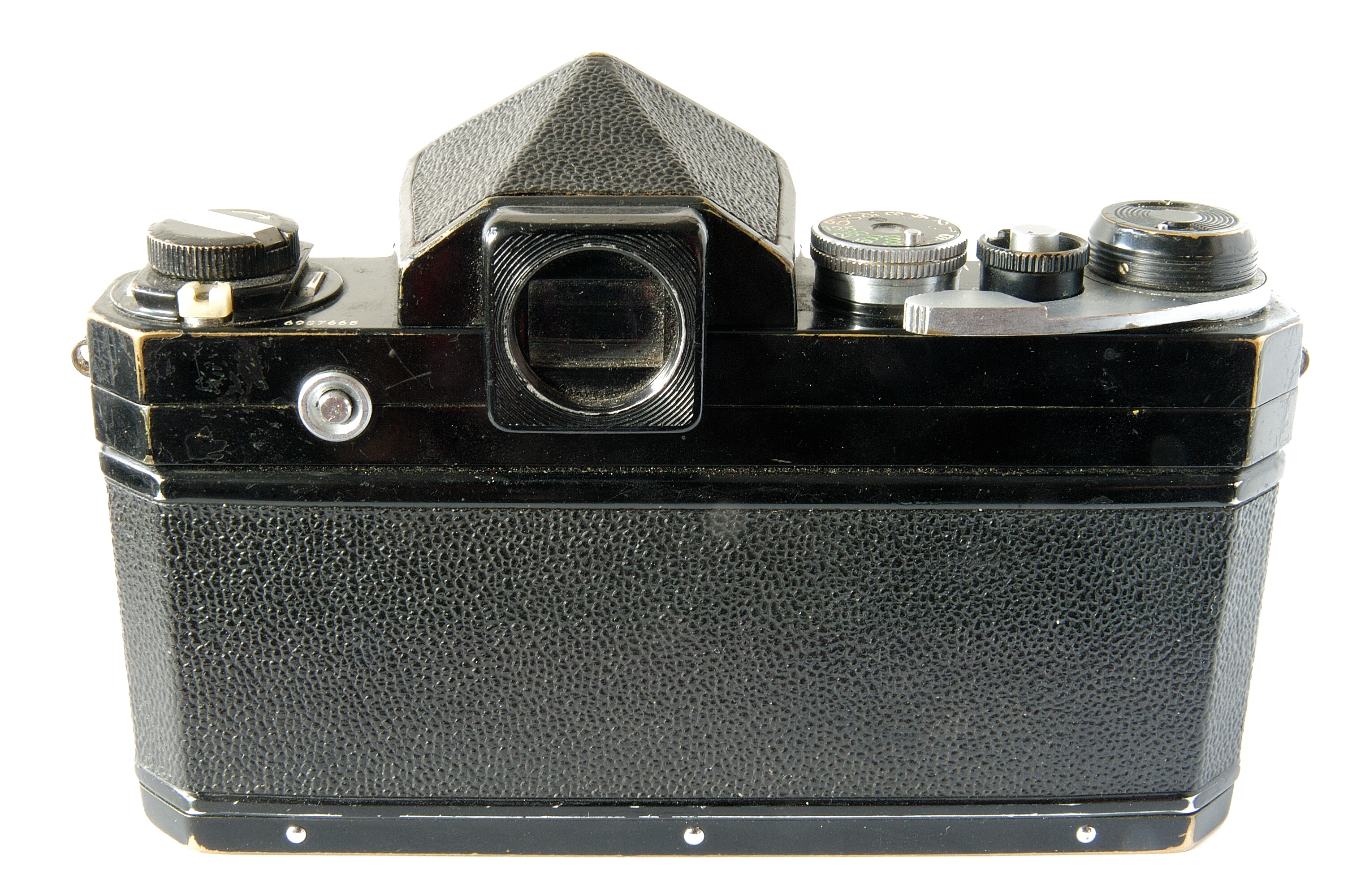 Nikon F